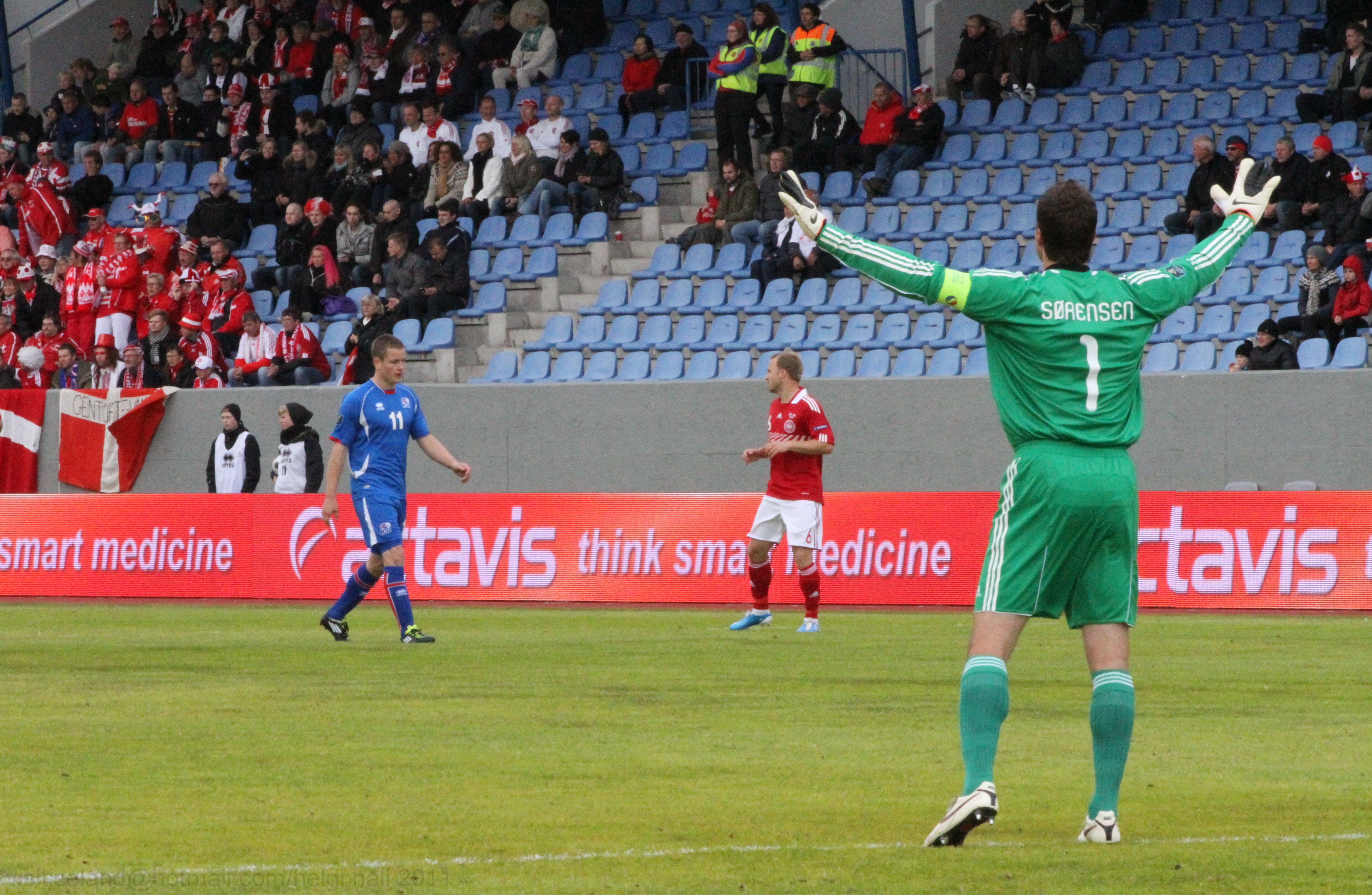 Iceland vs Denmark 4.6.2011